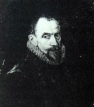 Retrato de Juan del Águila, realizado por Otto van Veen en 1587, en el Museo de Versalles